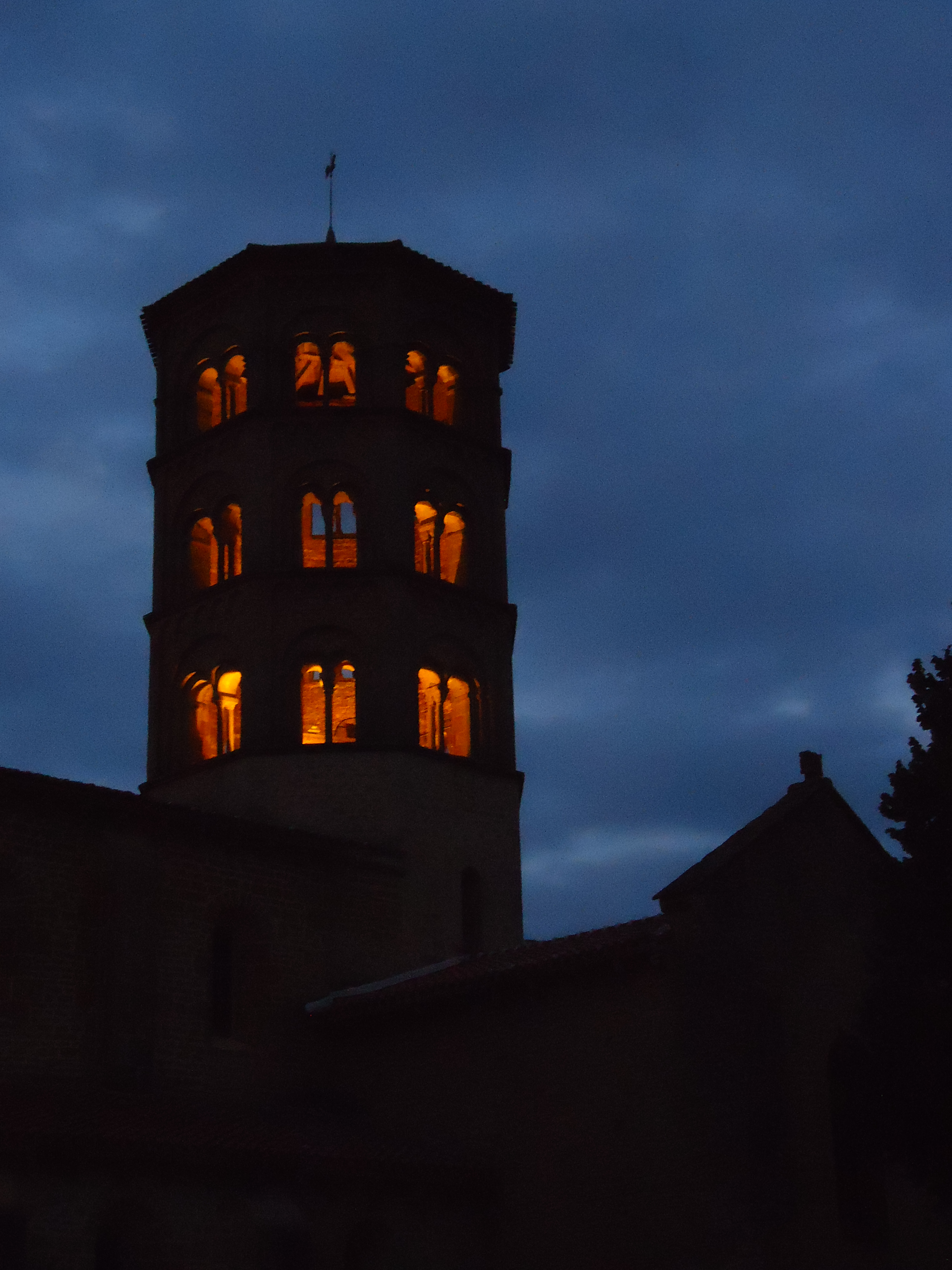 Église Notre-Dame-de-l'Assomption d'Anzy-le-Duc, XIe & XIIe - Vue depuis le prieuré - Saône-et-Loire (71)